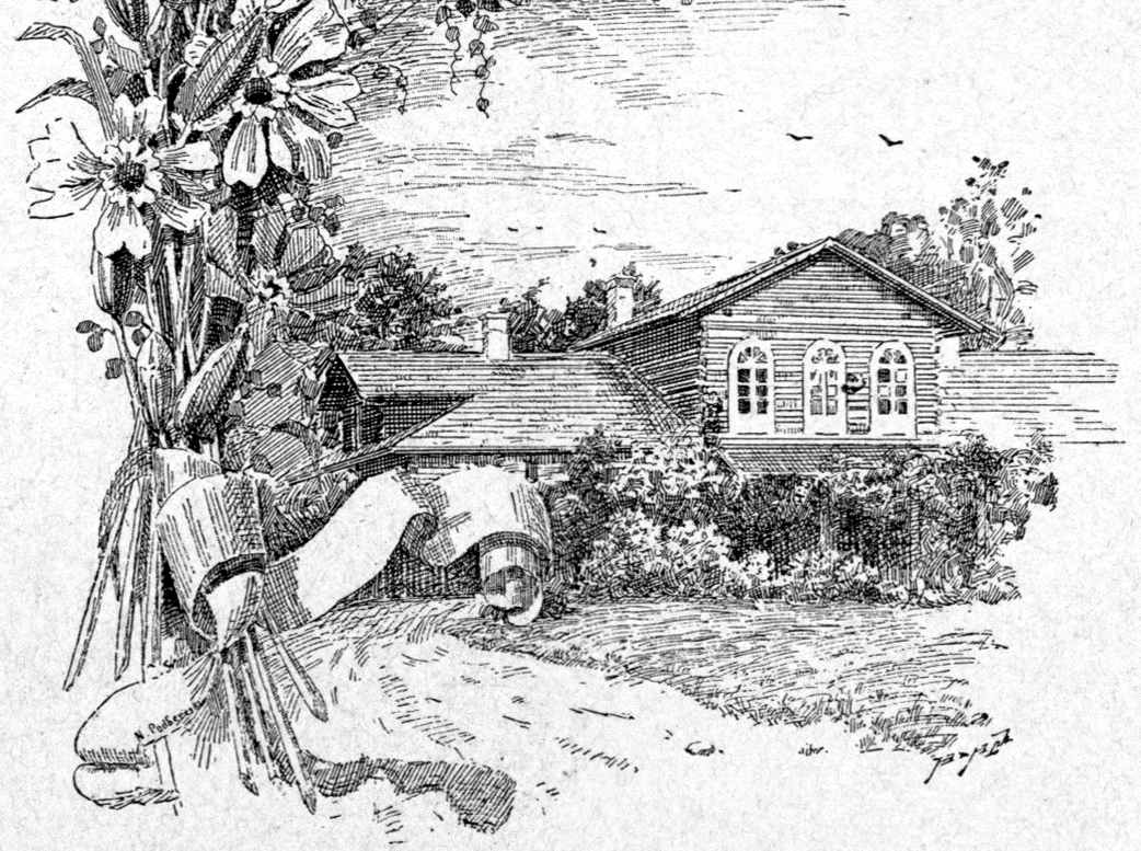 Беларуская (тарашкевіца): Аляны (Alany). Сядзіба Важынскіх (Važynski)